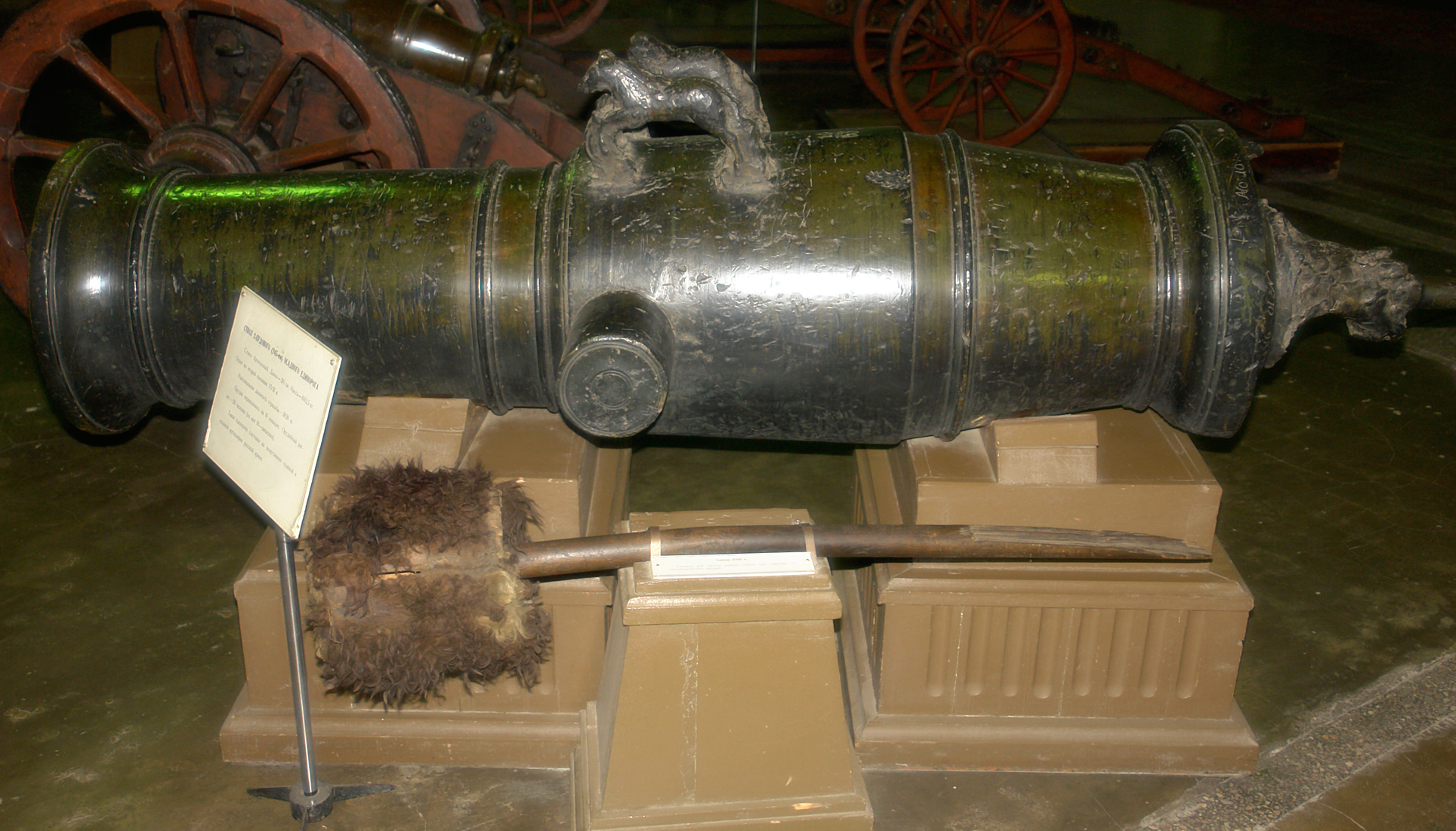 Ствол 2-пудового (245-мм) осадного единорога. Ствол бронзовый. Длина 216 см. Масса 1662.5 кг. Отлит во второй половине XVIII в. Максимальная дальность стрельбы 3620 м. Орудие перевозилось на 16 лошадях. Орудийный расчёт - 20 человек. Использовался в полевой осадной артиллерии русской армии. Снизу - банник XVIII в. Служил для чистки канала ствола.